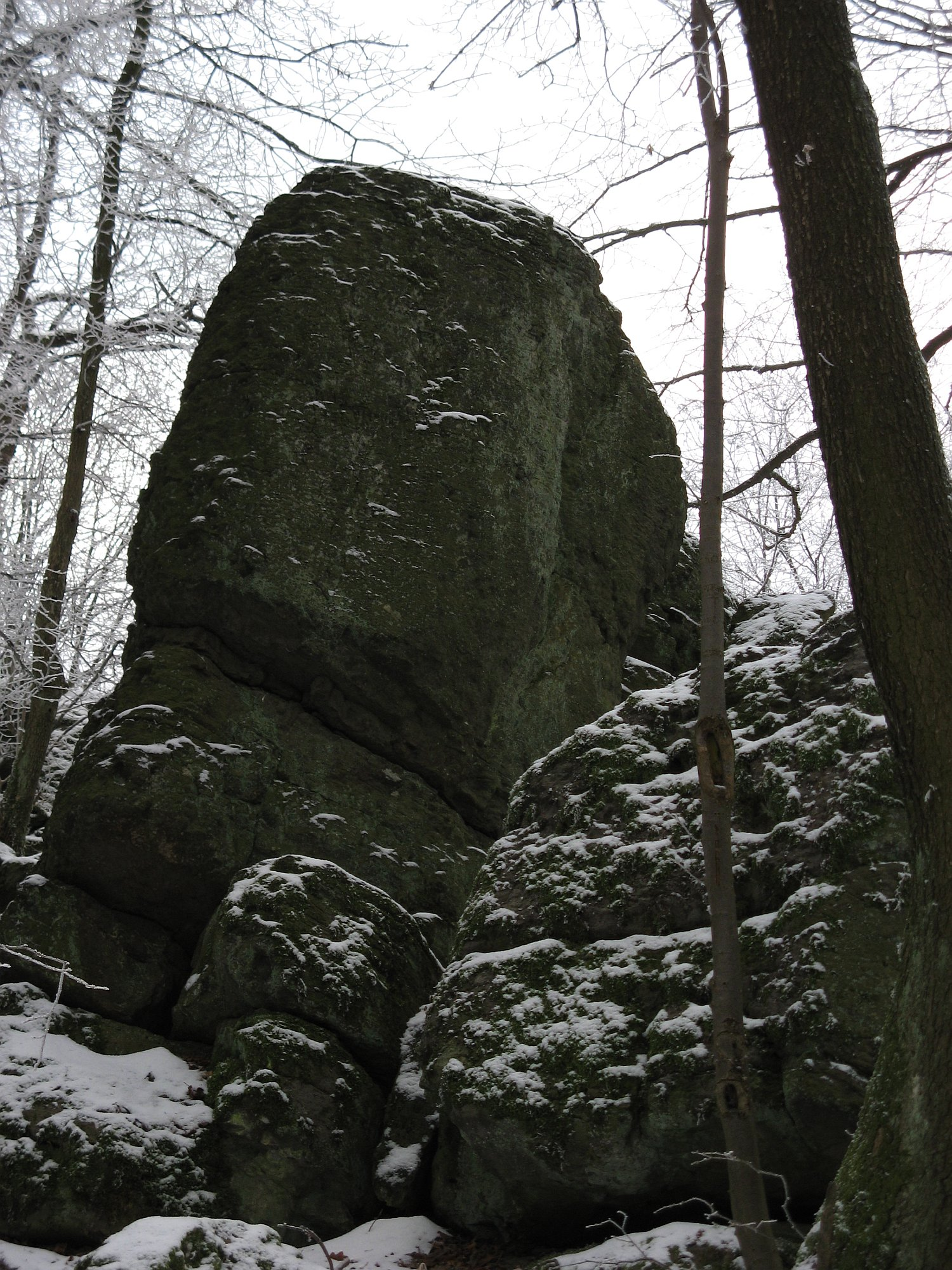 Basaltblockmeer (Olivinbasalt) am Heidenhäuschen im Westerwald